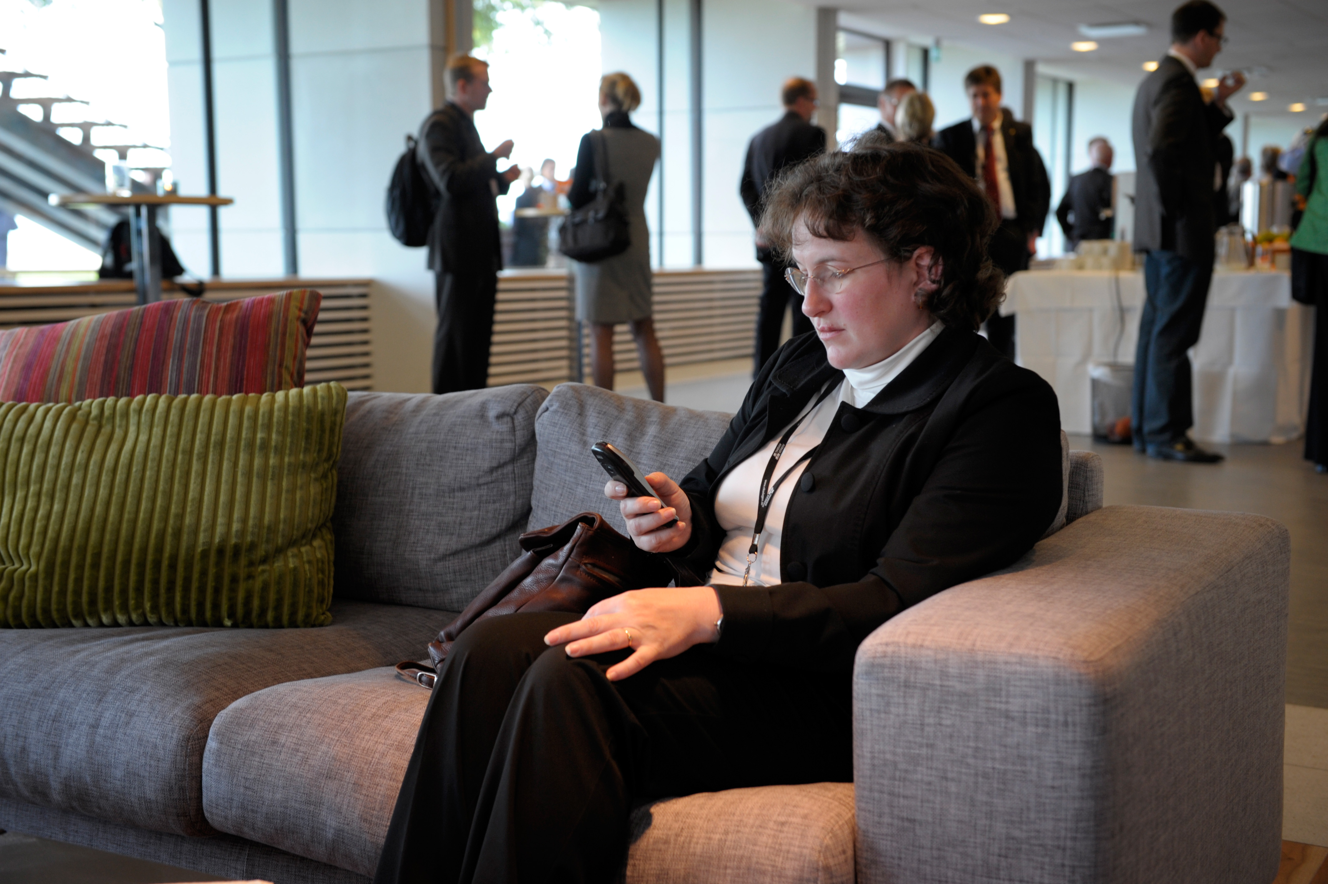 BSPC:s möte i Visby 2008-09-01